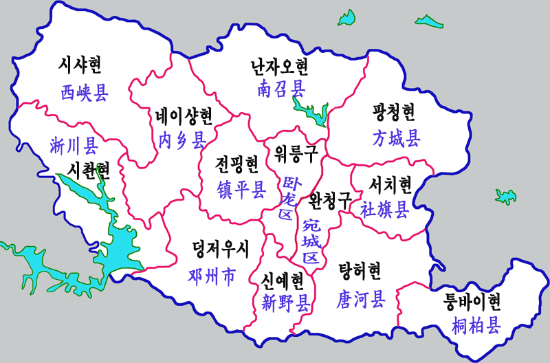 난양시 현급구역도